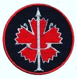 эмблема